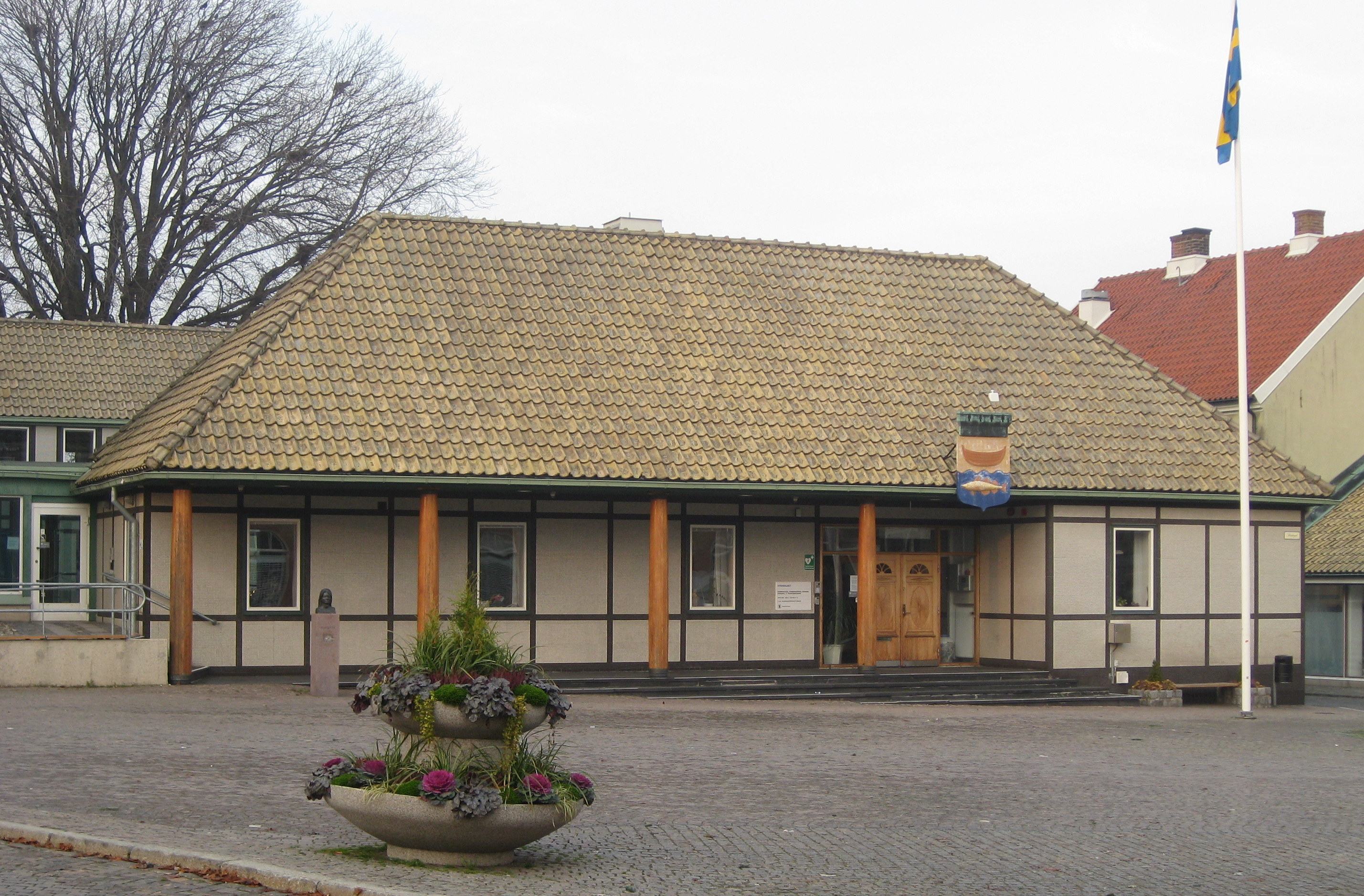 Ny rådhuset i Simrishamn, Skåne